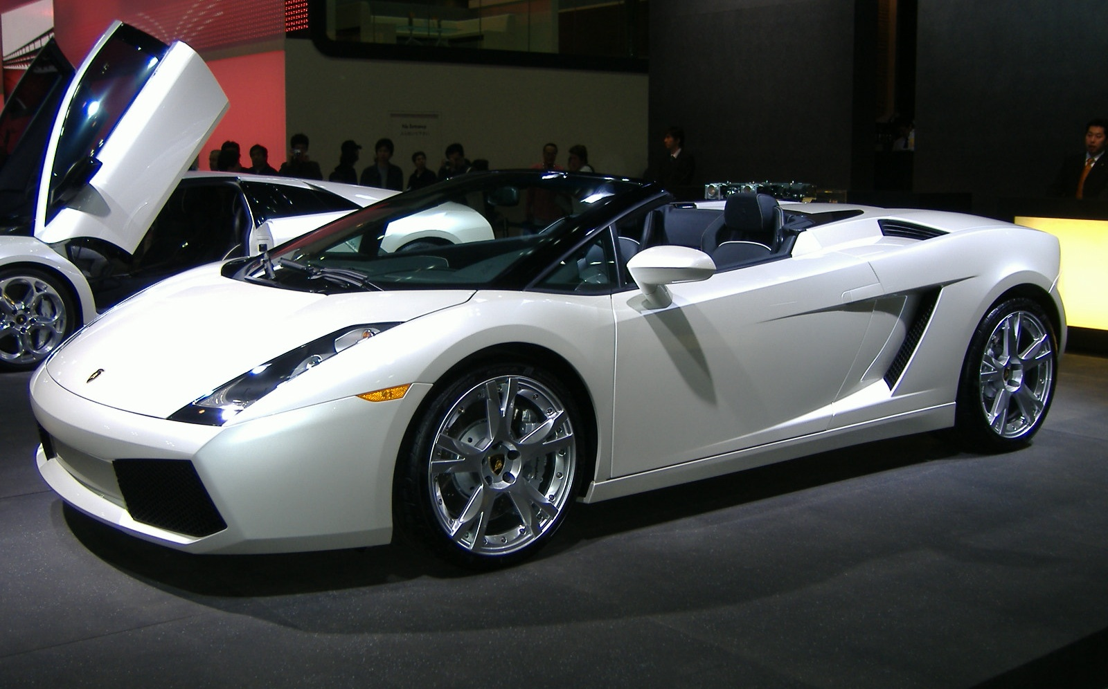 Lamborghini Gallardo Spider